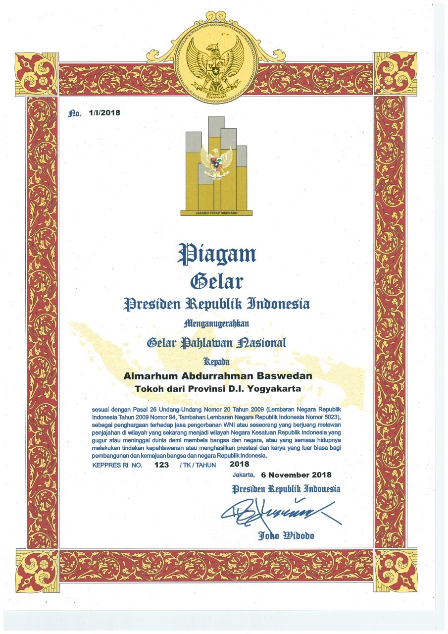 Piagam Gelar Pahlawan Nasional untuk A.R. Baswedan yang ditandatangani Presiden Joko Widodo